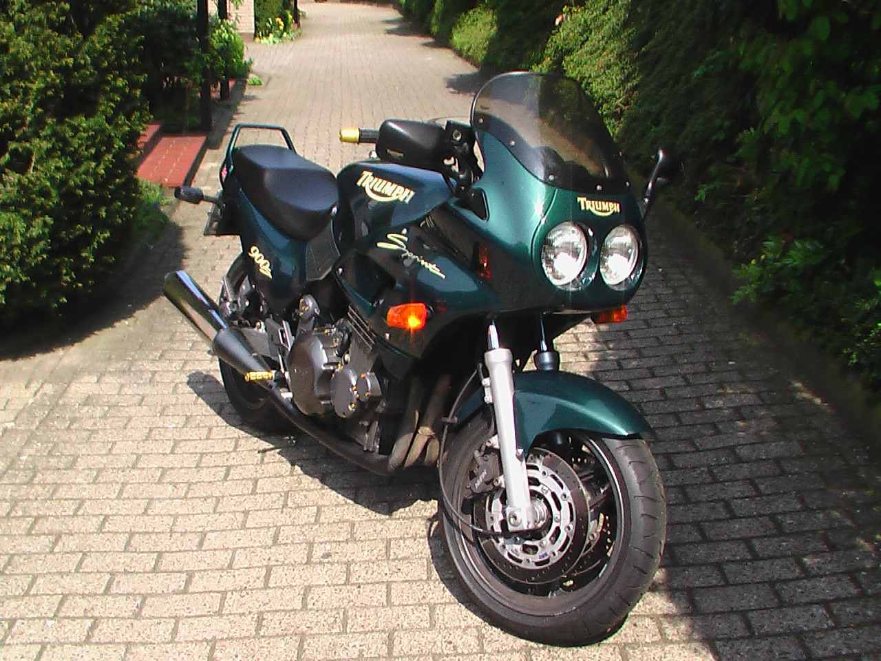 Bild einer Triumph Sprint 900 Baujahr 1995